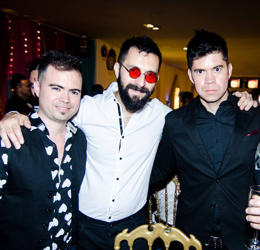 Iceberg del Sur